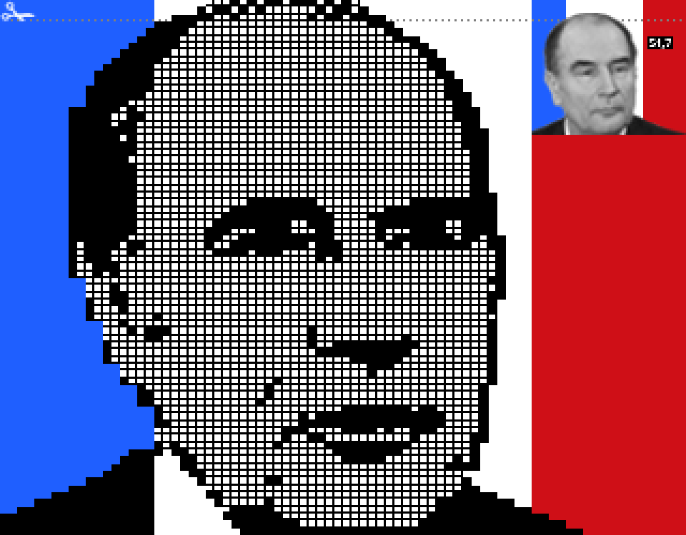 • Portrait de François Mitterrand en Minitel art Vidéotex le 10 mai 1981 à 20 heures sur Antenne 2. • Version 320×250 pixels (1ère ligne ajoutée car l'animation était très ambiguë sur les calvities). • Le ratio diffère de la photo sur INA.fr, où le portrait est plus mince (je vous laisse corriger). • Copie visuelle fidèle aux blocs tels que vus à la télévision (caractères semi-graphiques testés). • Source et Minitel-artiste inconnus [contribution souhaitée] - cette photo est-elle déjà oubliée ? • (Il s'agit d'un style de dessin à l'encre de Chine ; le haut semble avoir été retouché à droite.) • (Le fichier a peut-être ensuite circulé à l'époque ; mais concernant celui du portrait de VGE… ?)